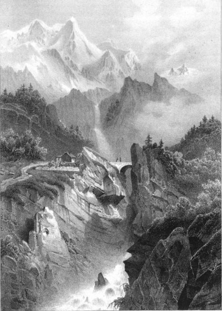 Album du Dauphiné - tome IV, litographie de la rivière du Diable, près de St Christophe en Oisans